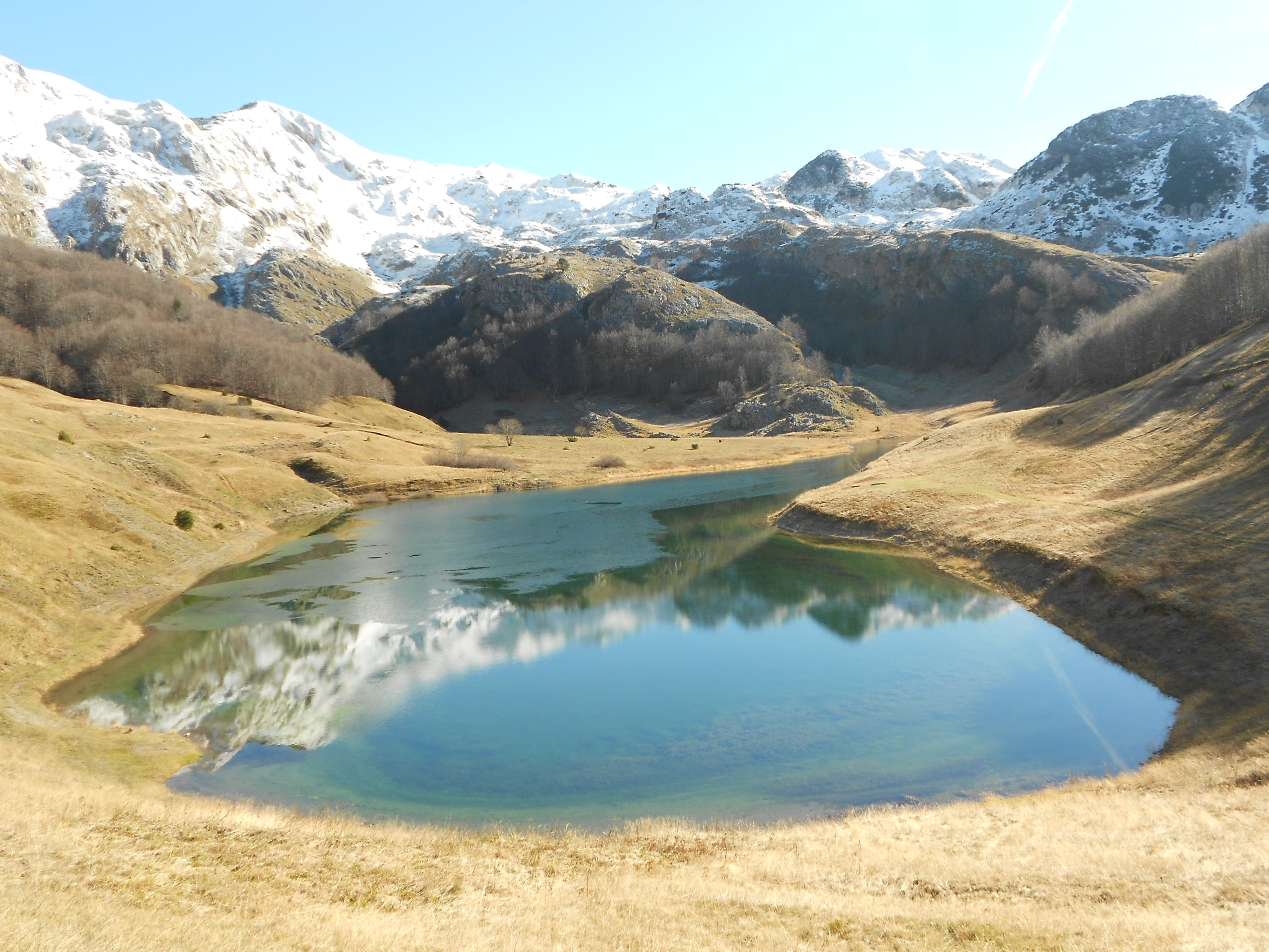 Template:Tos